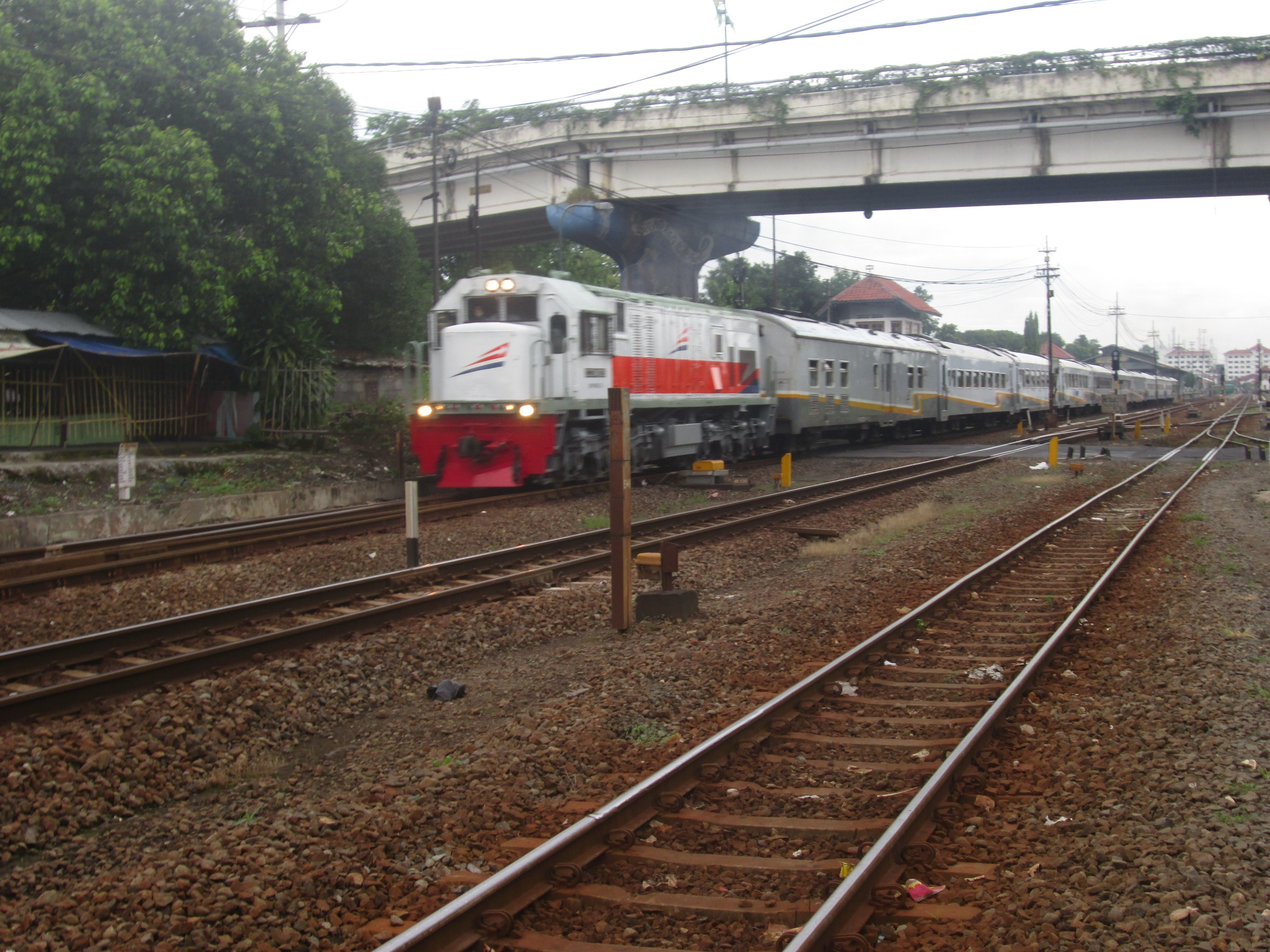 CC 204 03 03 menarik kereta api Sancaka di Stasiun Lempuyangan